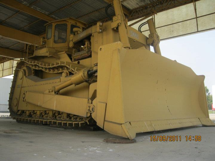 Vista del Super-Bulldozer Acco